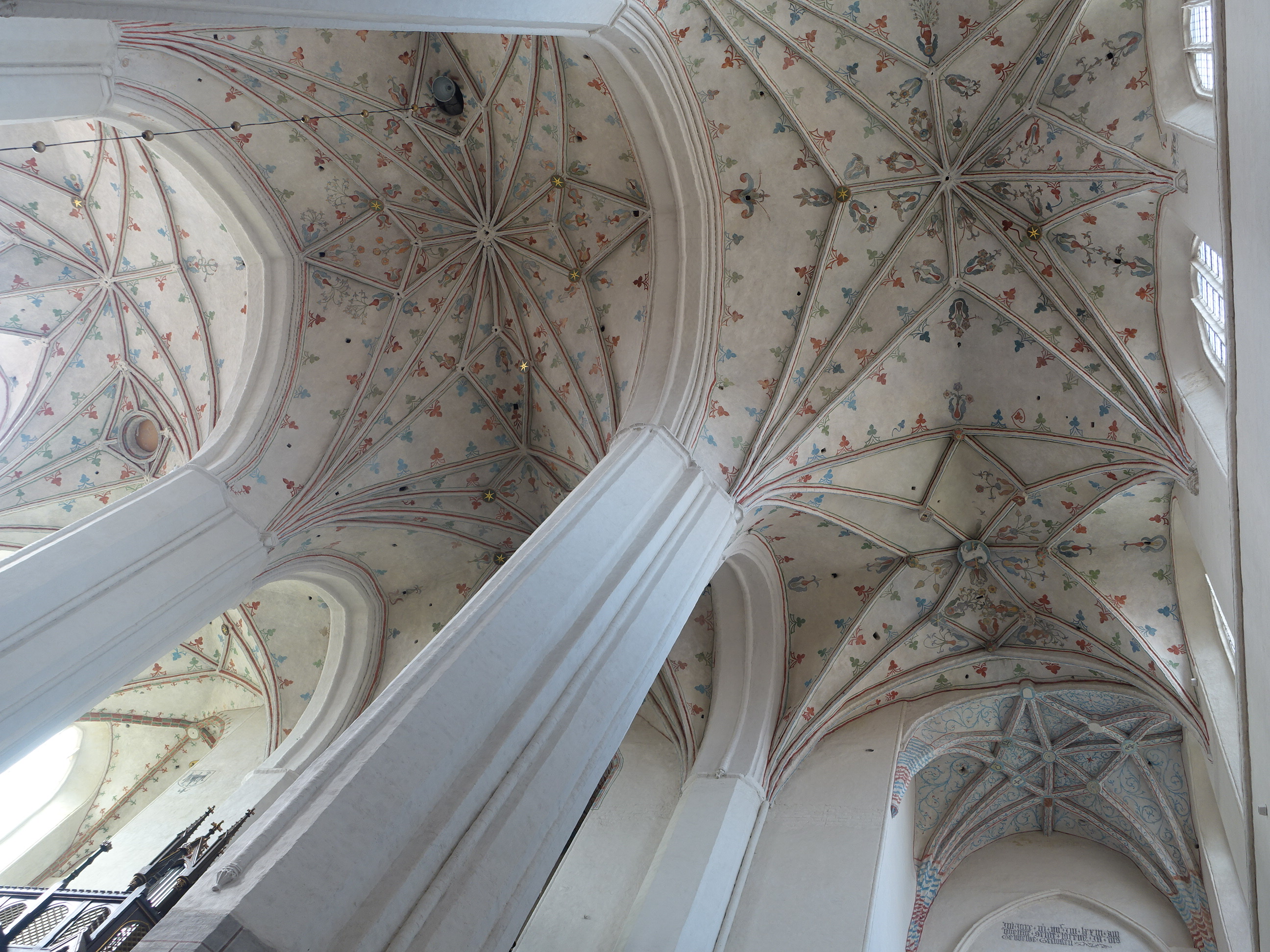 Gewölbe des Johannisdoms in Thorn